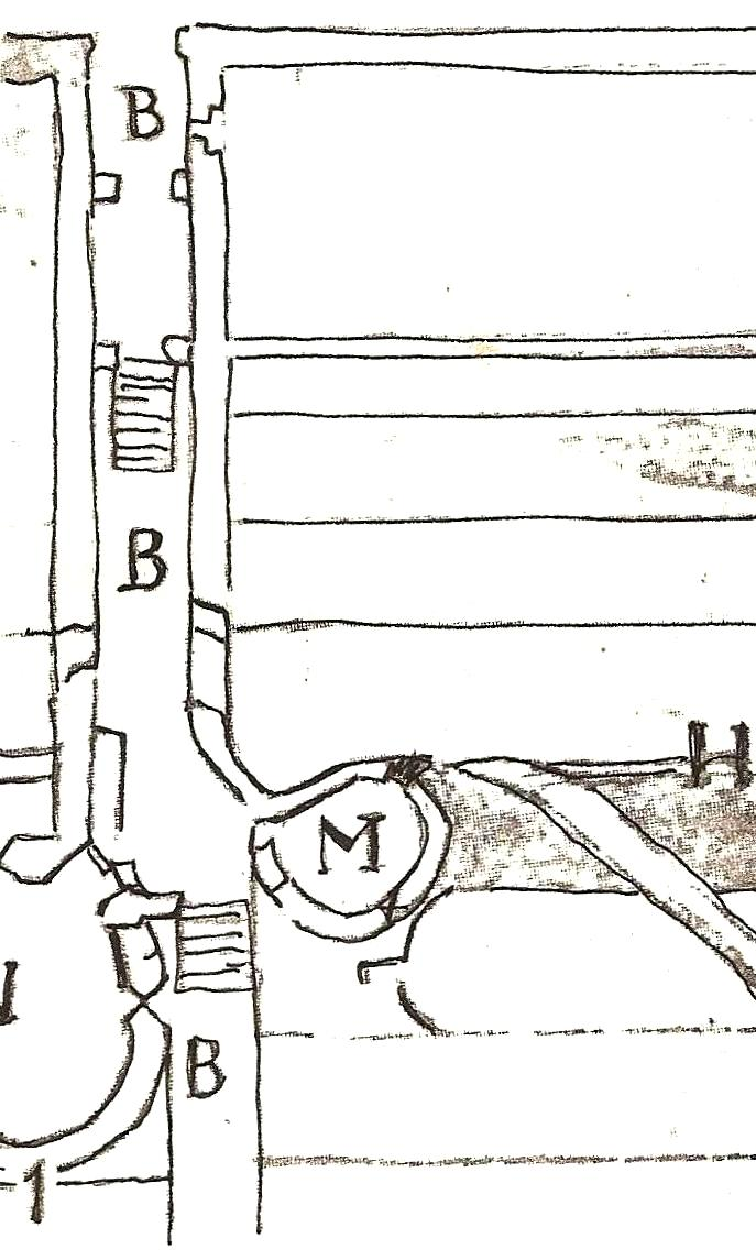 схама брами львова: схема укріплень брами